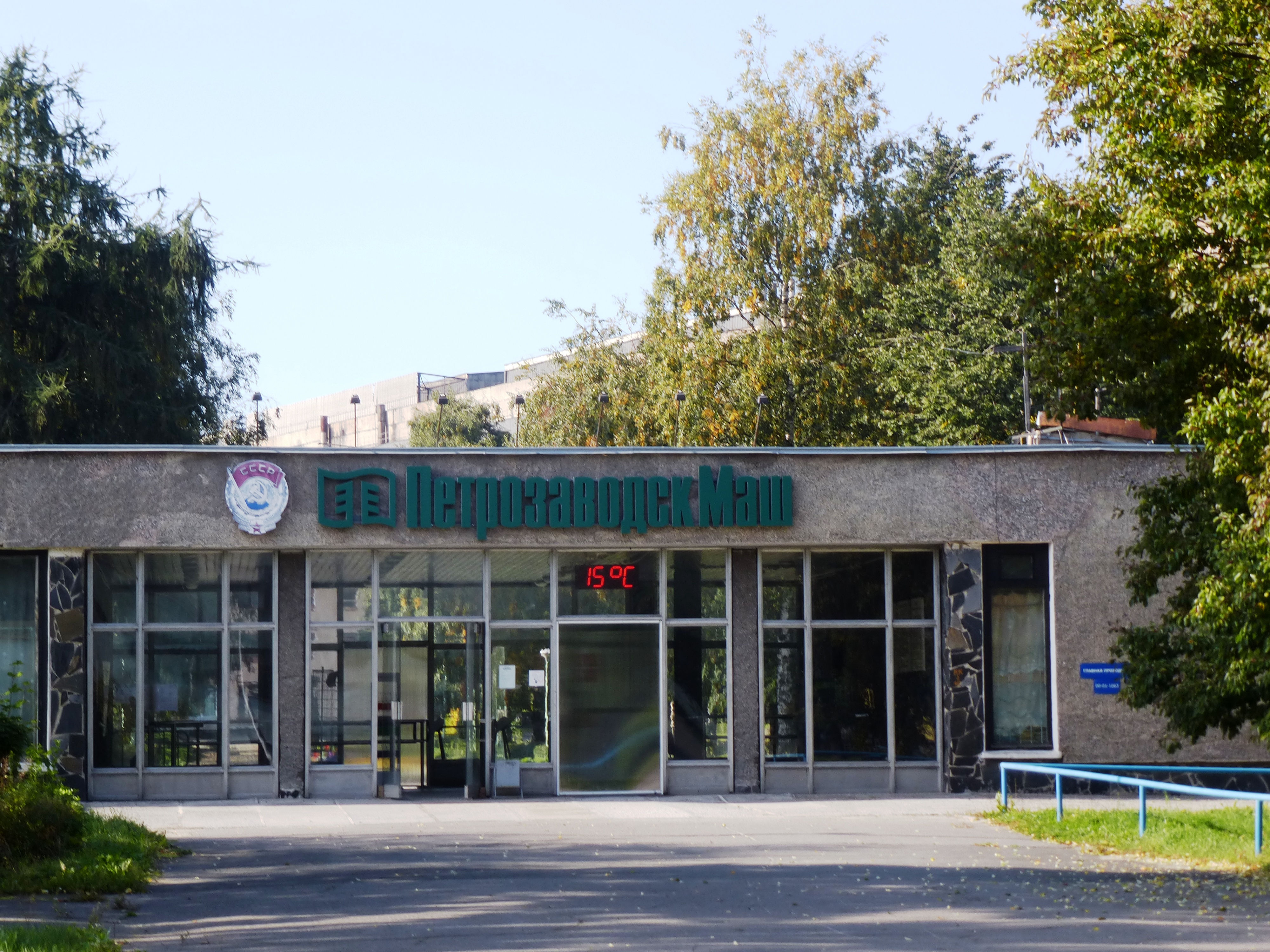 Центральная проходная завода "Петрозаводскмаш" на ул.Заводской в Петрозаводске